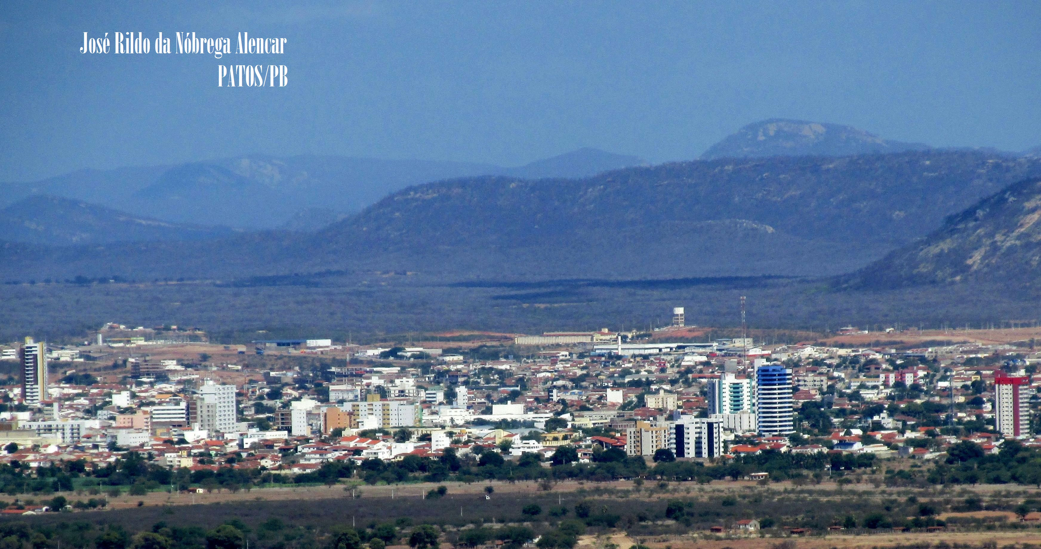 Patos/PB, “A Capital do Sertão”.